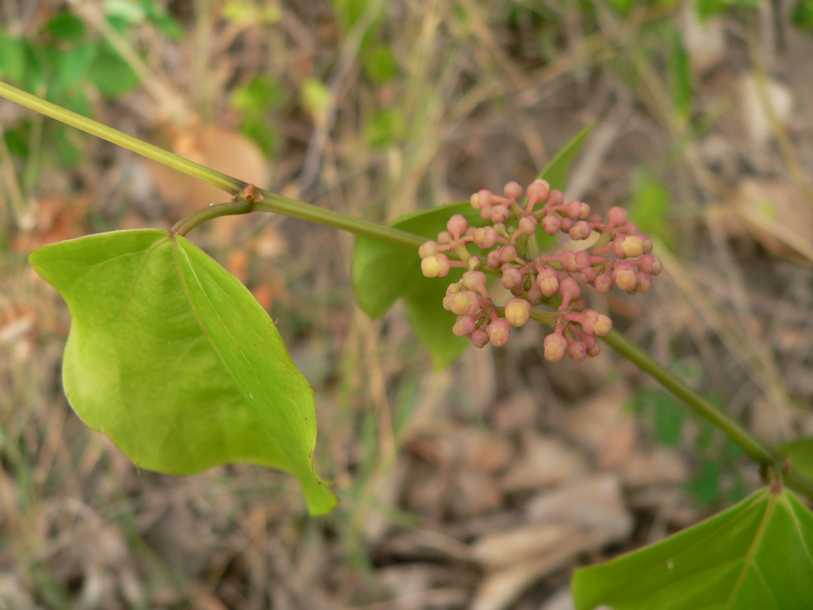 Cissus verticillata, Guadeloupe